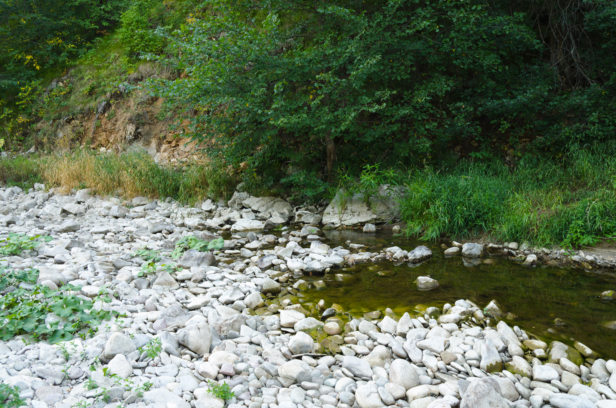 river